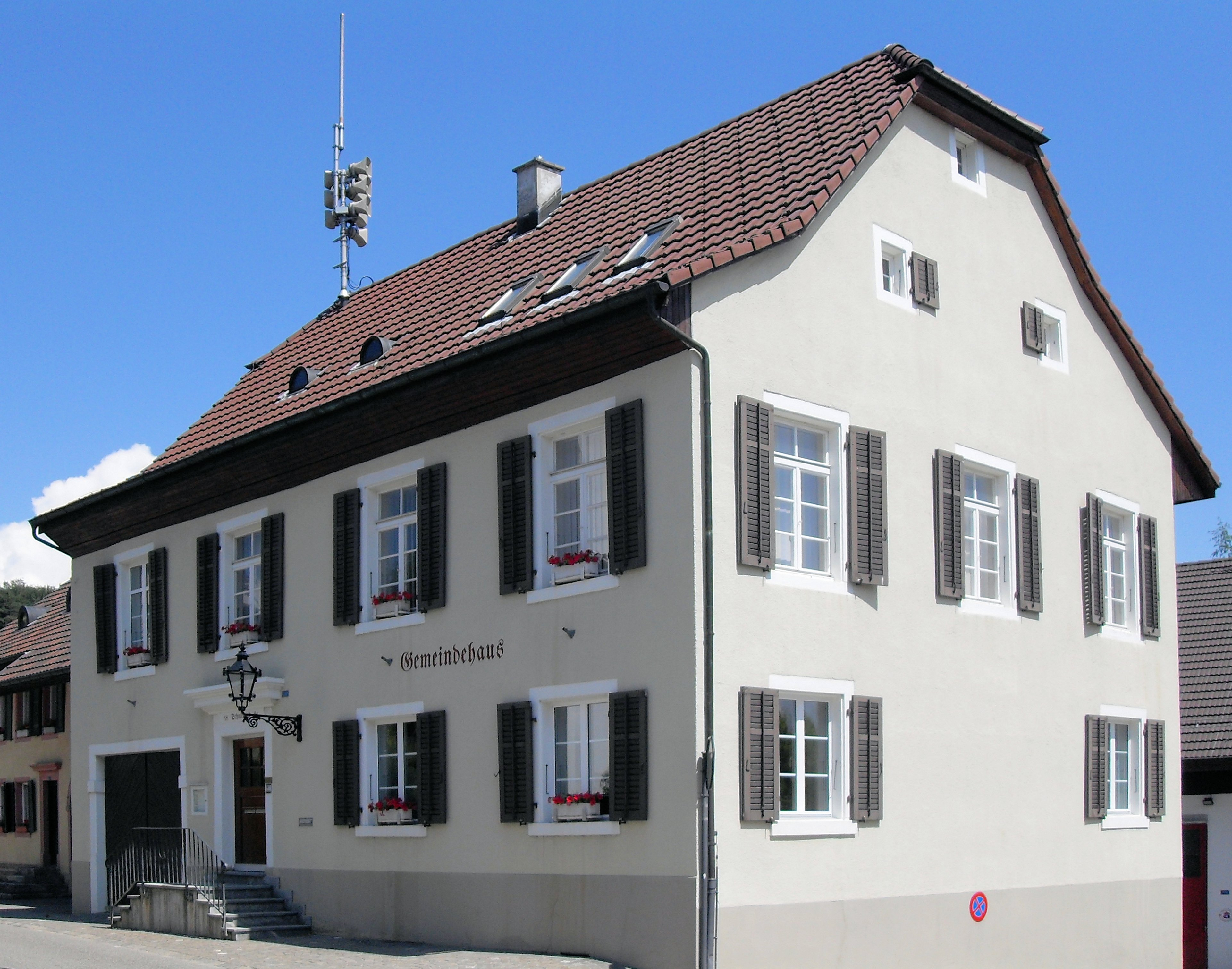 Gemeindehaus in Gempen, Kanton Solothurn, Schweiz